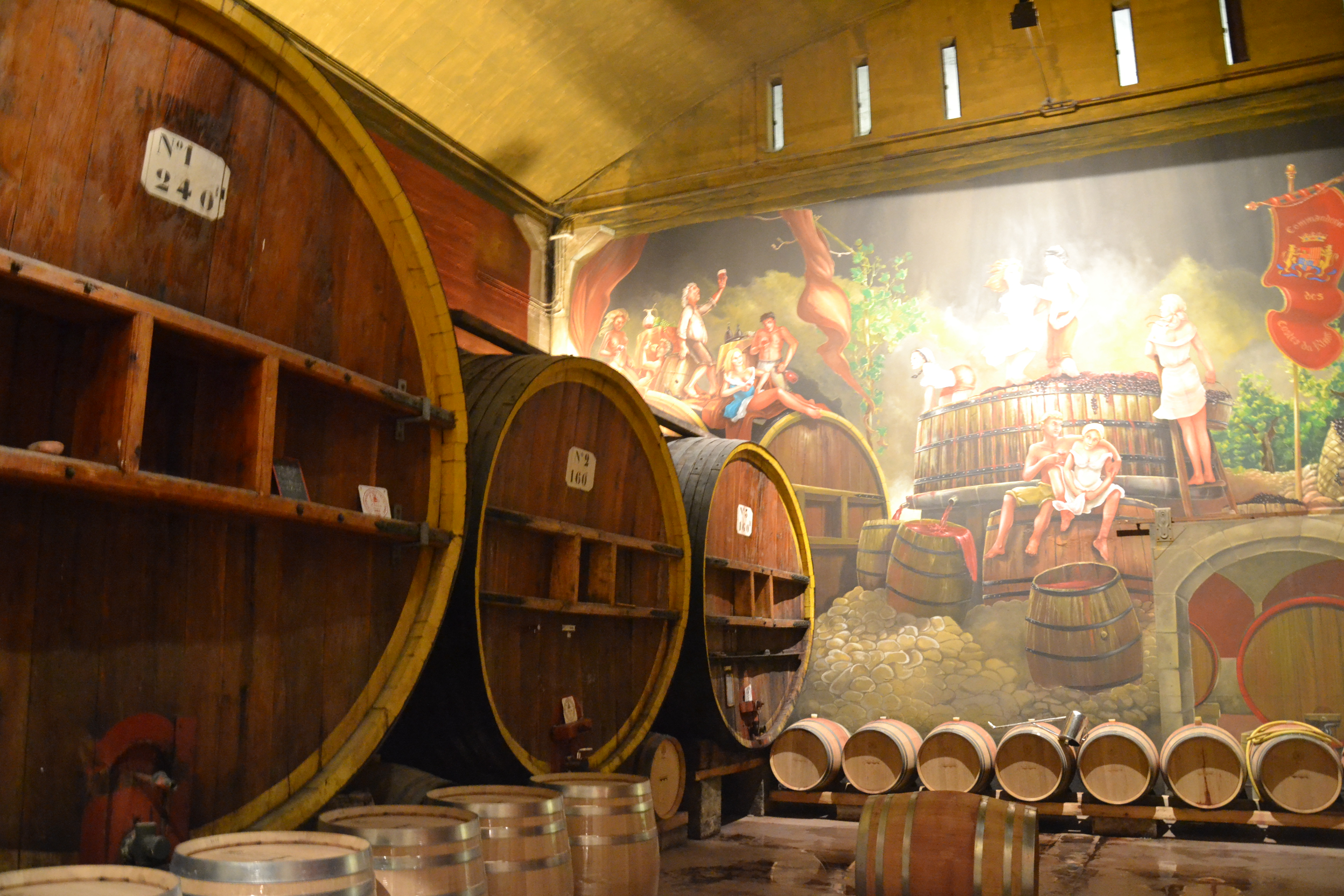 Cave coopérative viticole de Morières-lès-Avignon : salle des foudres